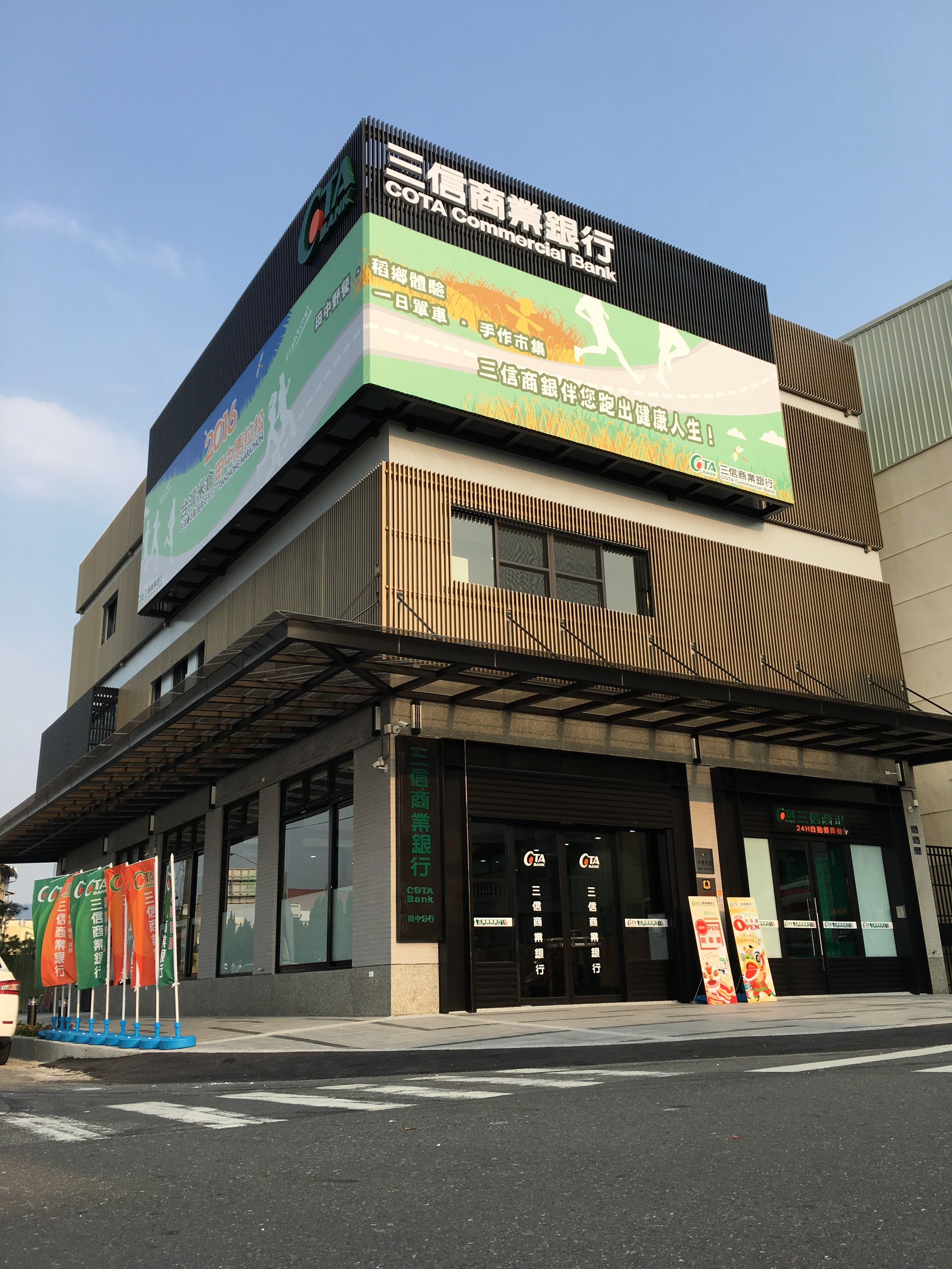 三信商業銀行田中分行